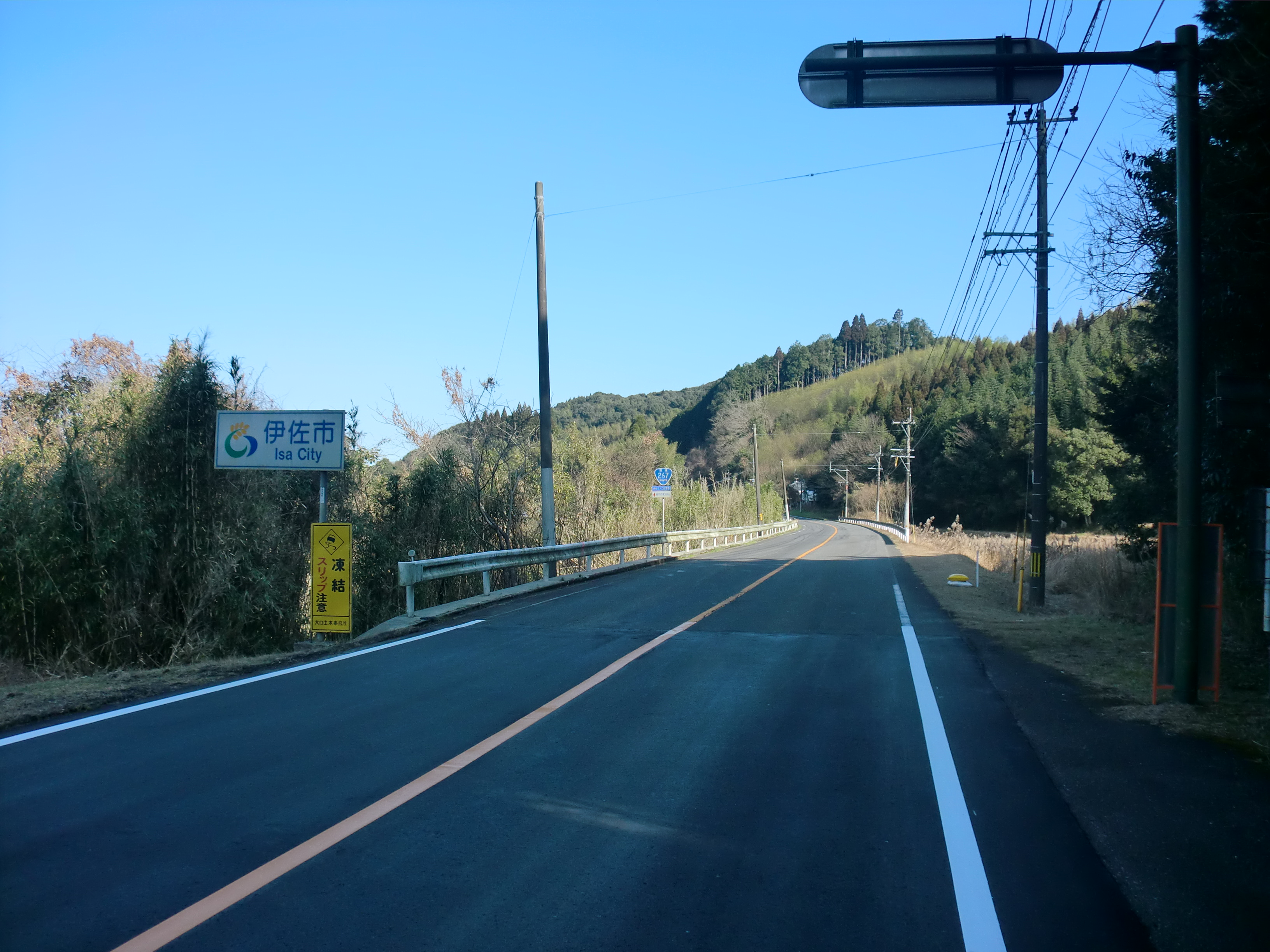 国道267号線。薩摩郡さつま町と伊佐市の境界